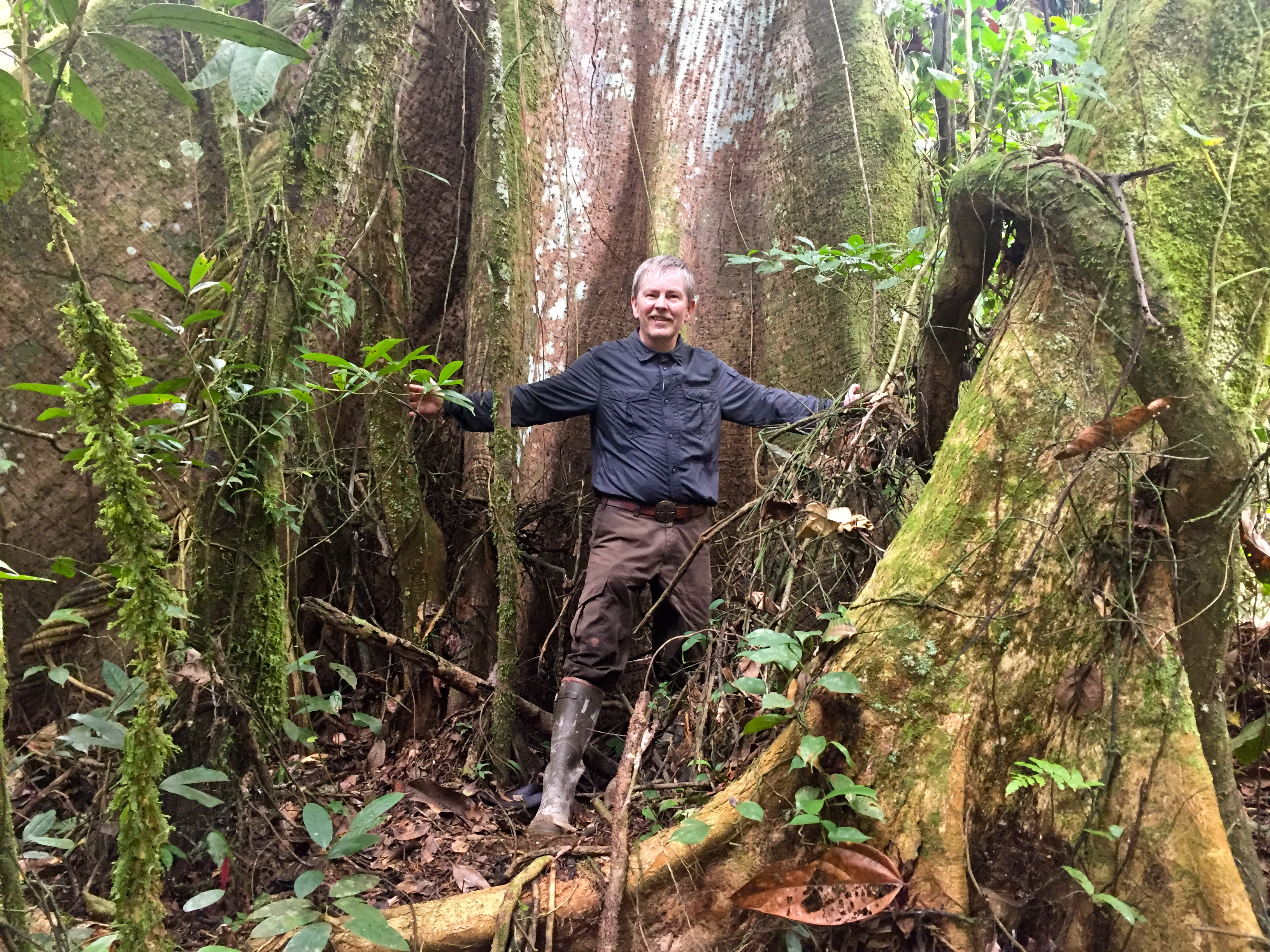 Tourist (dt. Wikipedia-Autor "Fährtenleser") vor einem Urwaldriesen im Cuyabeno Wildtier-Reservat, Ecuador. Die Genehmigung von Fährtenleser liegt vor.